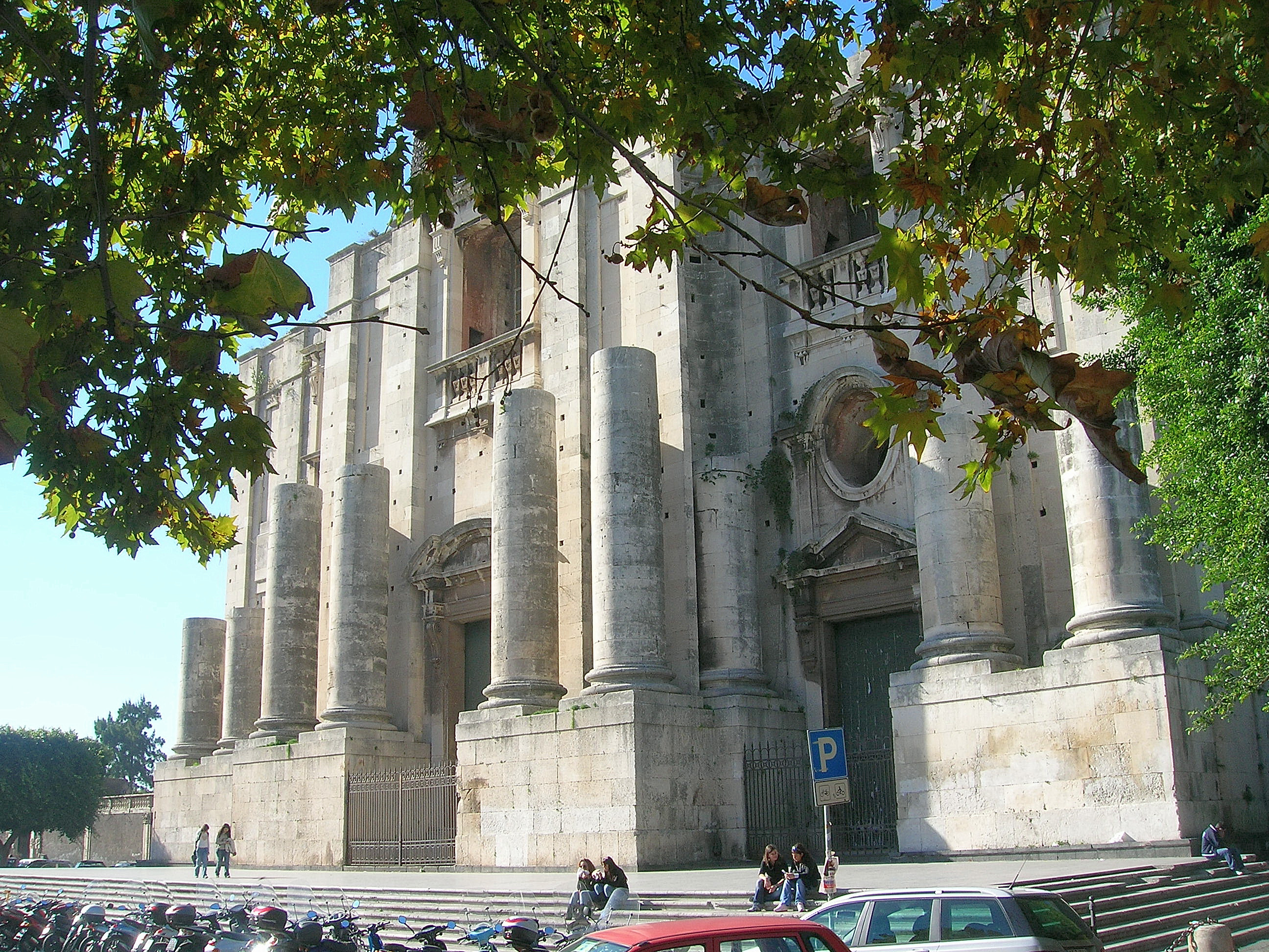 Chiesa di San Nicolò l'Arena, Catania